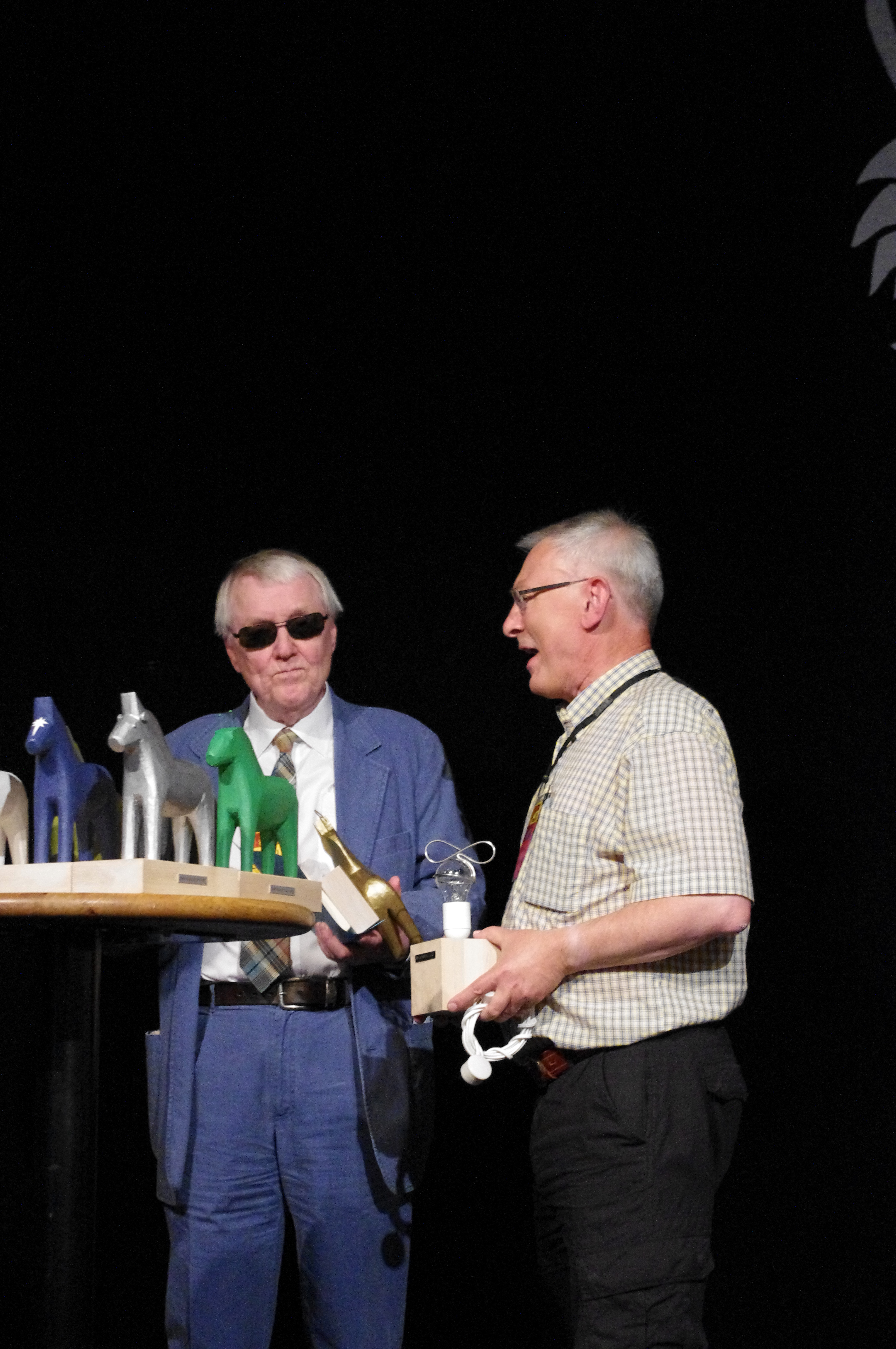 Tomas Cronholm tar emot Alvarpriset (Alvar Appeltoffts Minnespris) (till höger) och Sam J. Lundwall har tilldelats "European Grand Master" av ESFS. Eurocon (Swedcon) 2011, Stockholm.